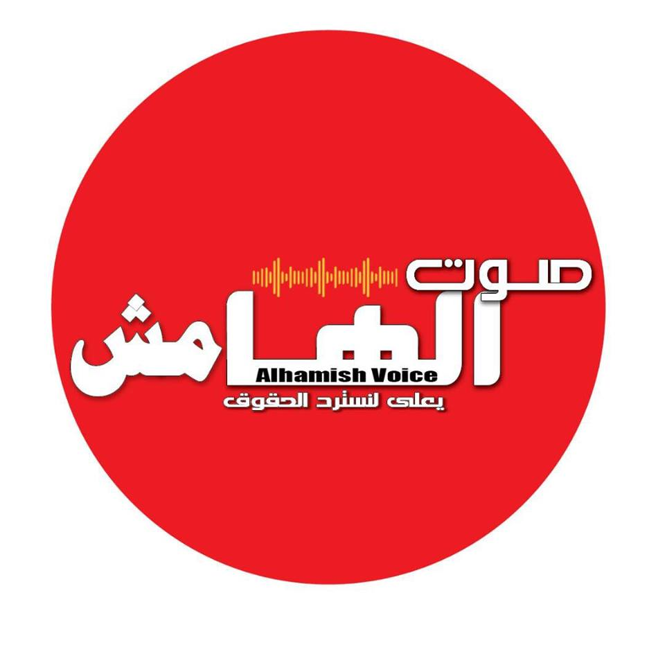 شعار صحيفة صوت الهامش.